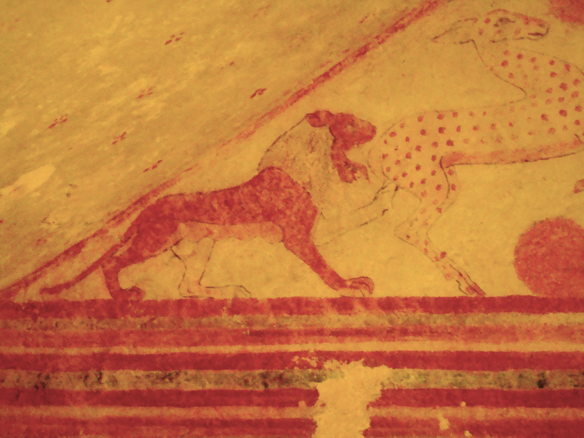 Tomba dei Baccanti - Nécropole de Monterozzi - Museo archeologico nazionale tarquiniense - MIBAC - Tarquinia This is a photo of a monument which is part of cultural heritage of Italy.